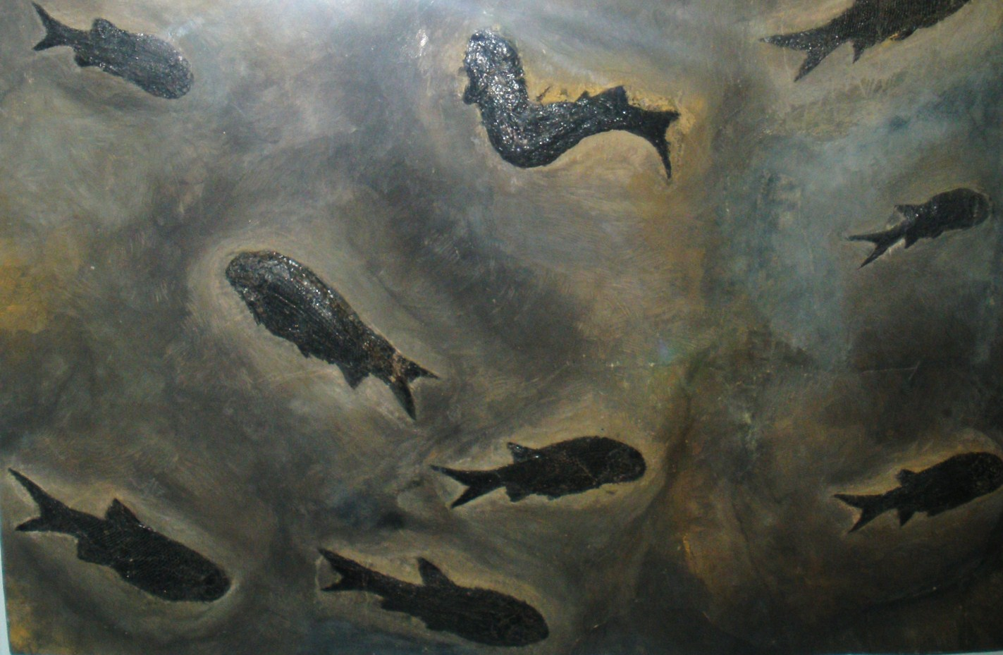 Fossil of Paramblypterus, an extinct fish- Took the photo at Senckenberg Museum of Frankfurt